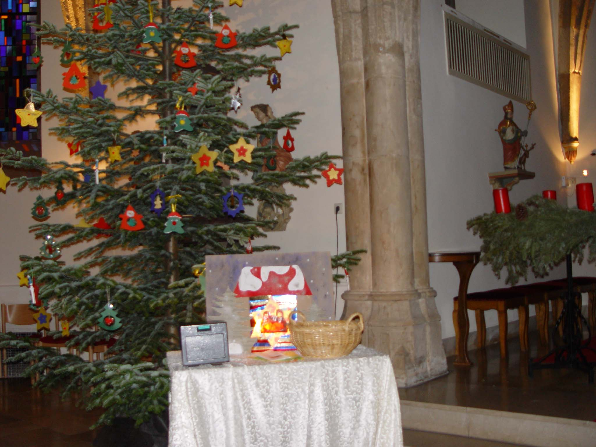 Krëppchen an der Bartrenger Kierch fotograféiert den 20. Dezember.